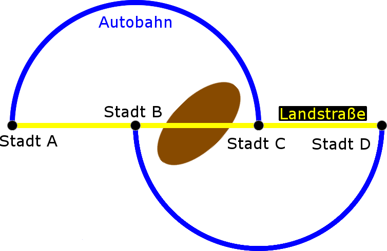 Illustration zum Braess-Paradoxon